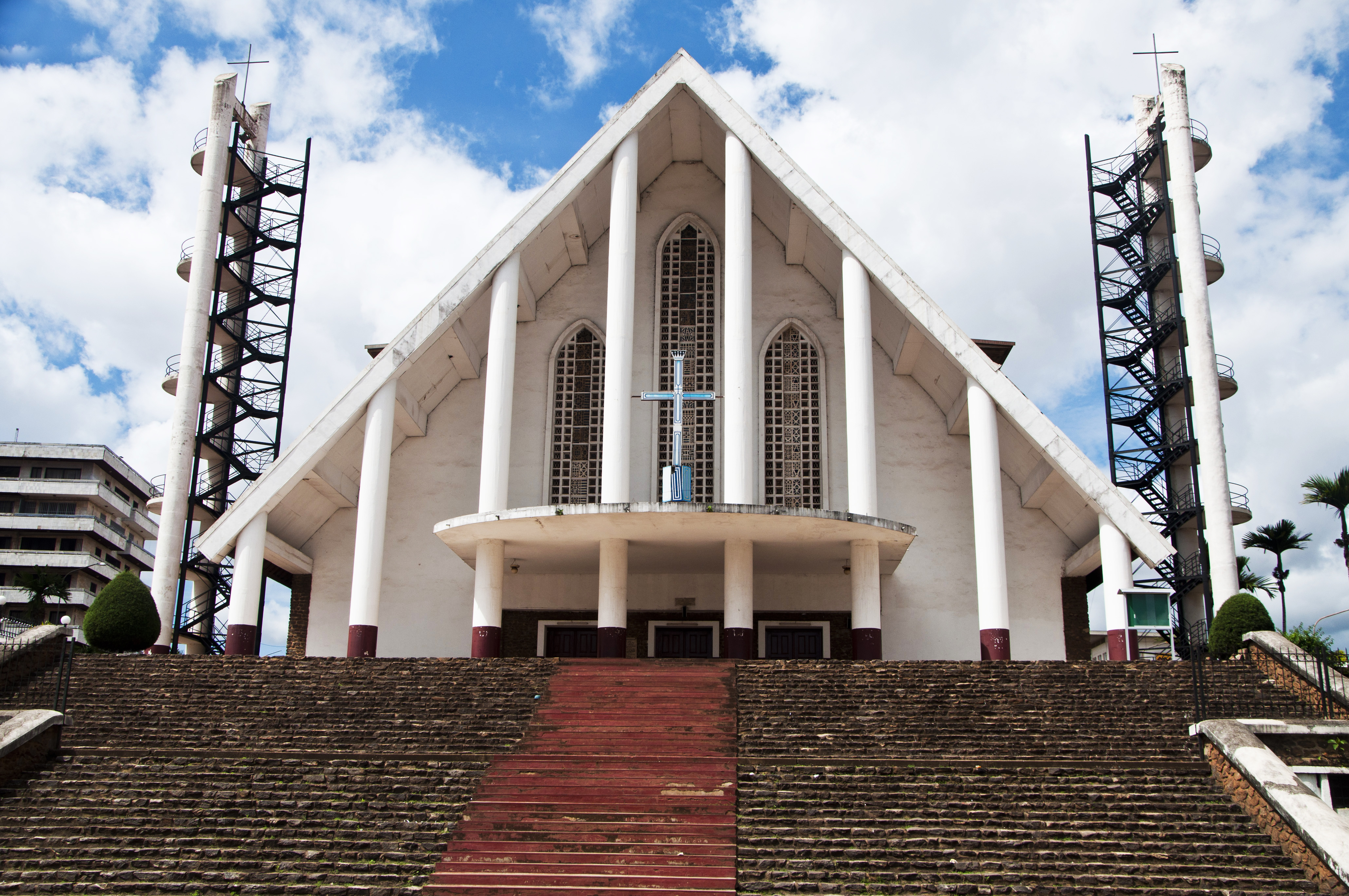 Cathédrale notre dame de victoire de Yaoundé